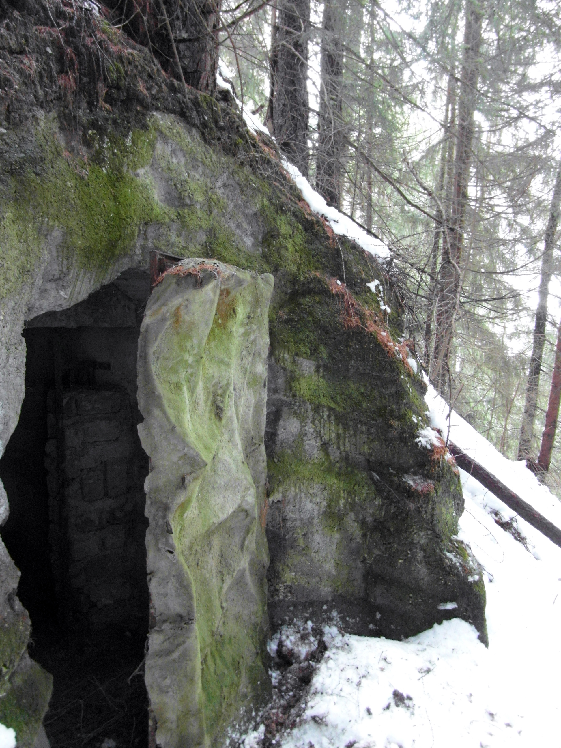 Opera 24 Tenne